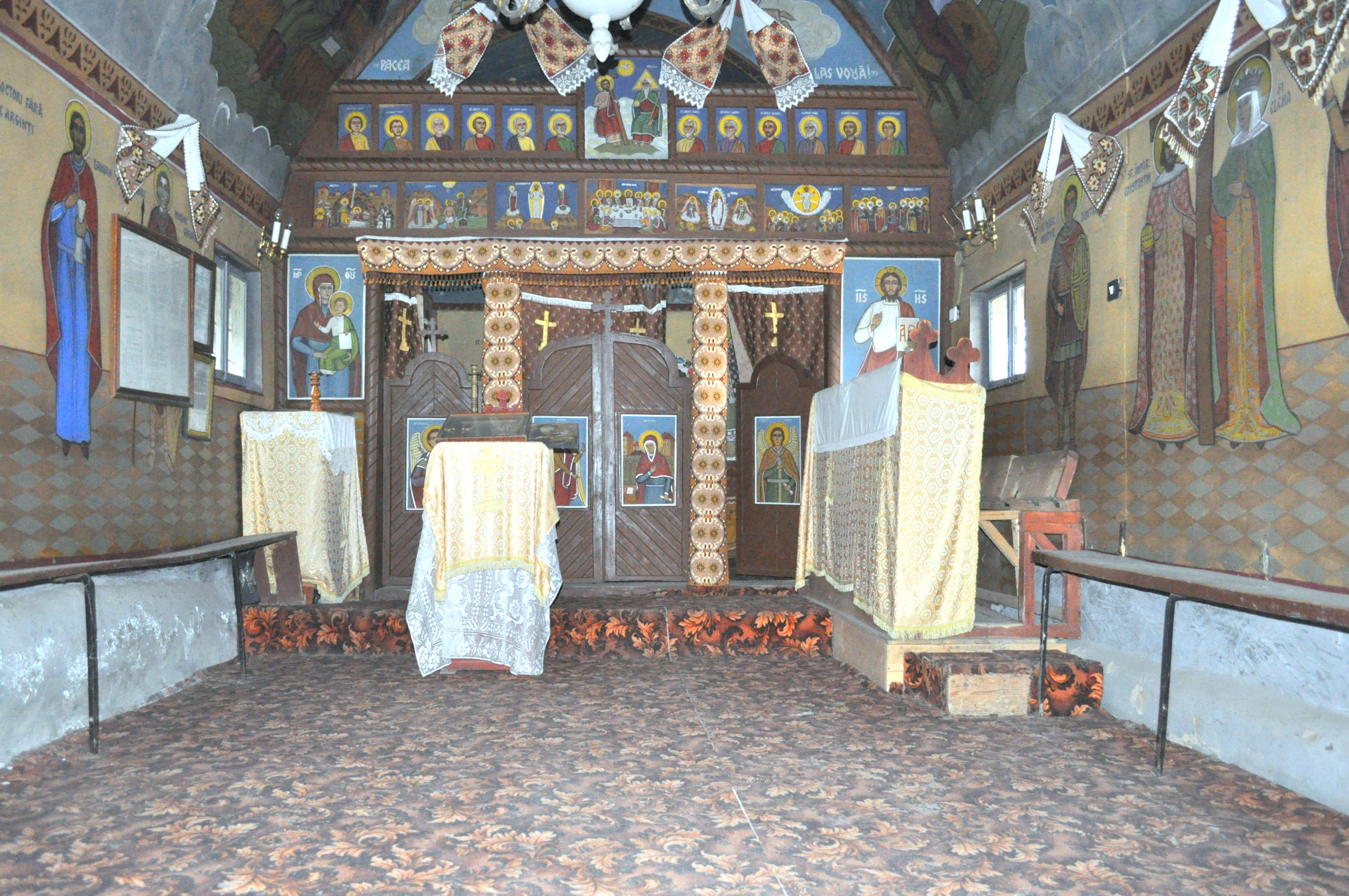 Biserica de lemn "Sfinții Arhangheli Mihail și Gavriil" din Chichișa, comuna Românași, judeţul Sălaj